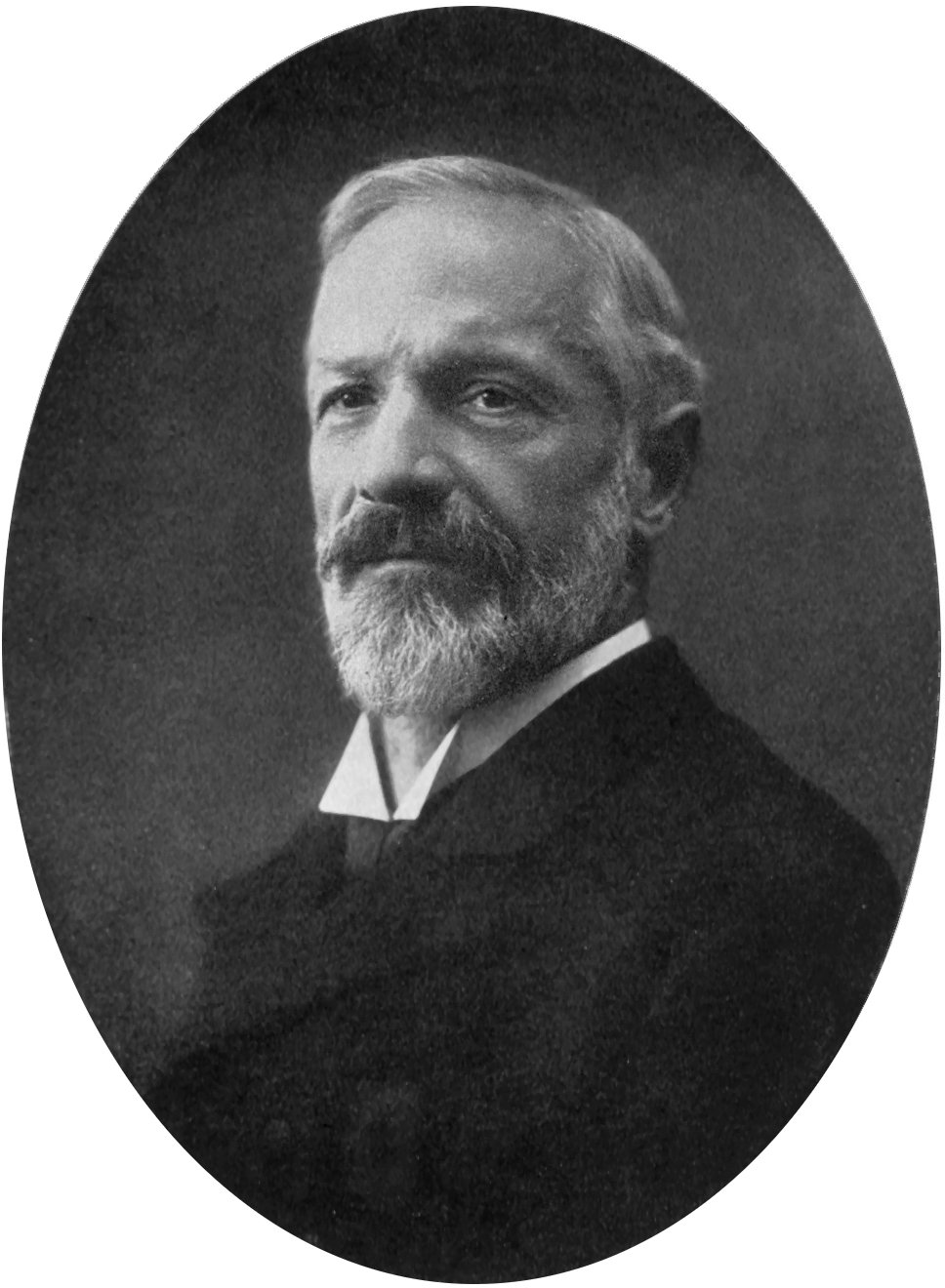 Fotografie Hans von Chiari